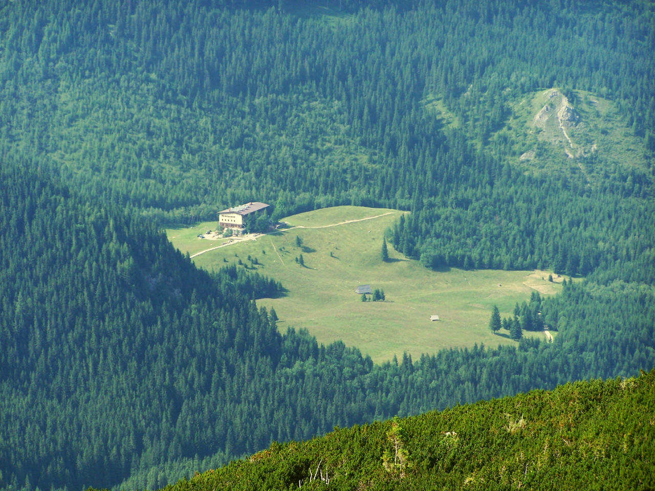 Kalatówki (Tatra Mountains)